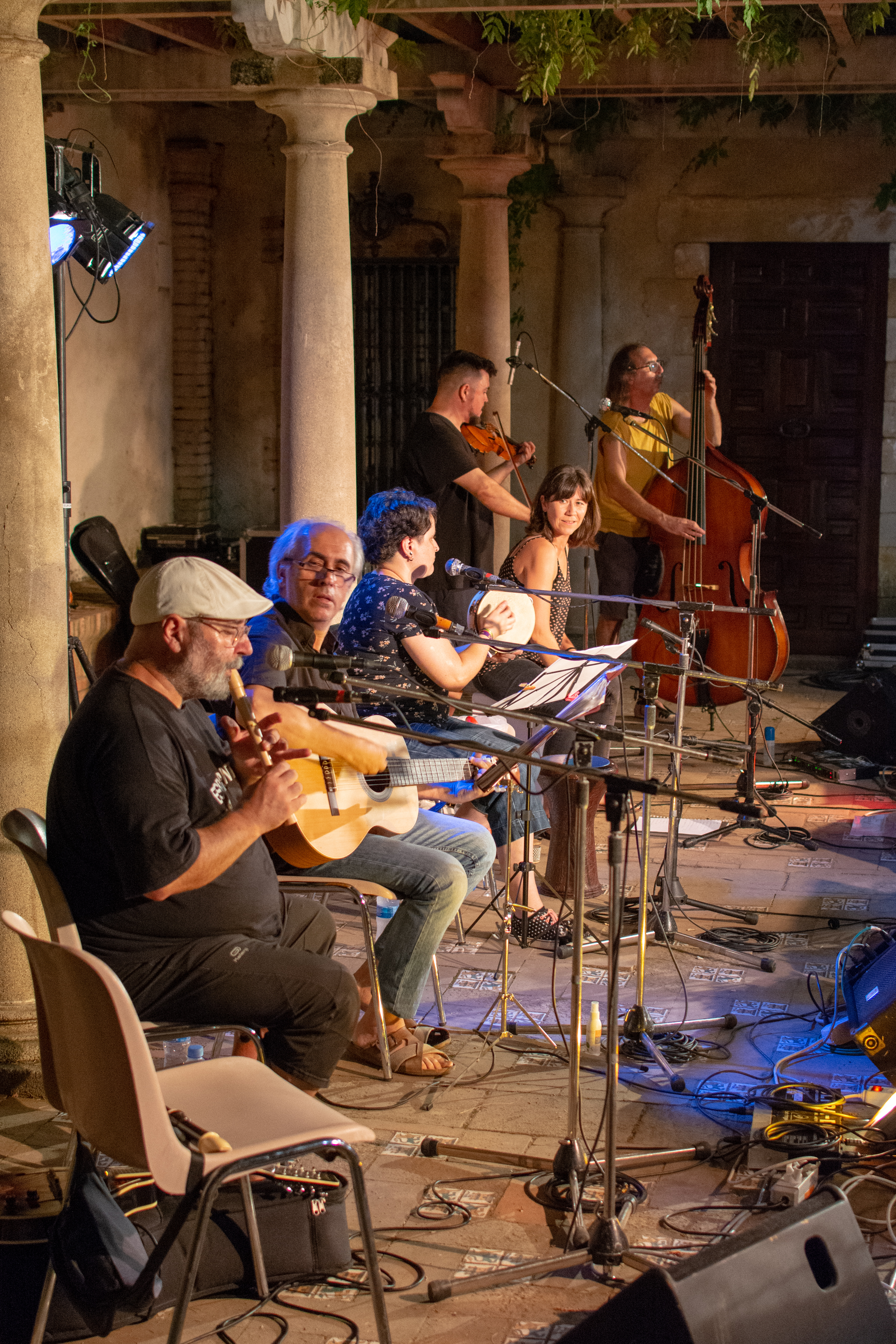 Koncerto de Kaj Tiel Plu dum la SAT-Kongreso 2019